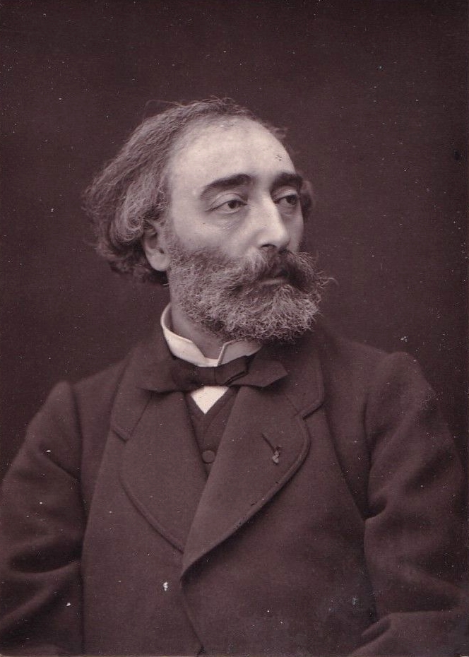 Portrait d’Émile Lévy (1826-1891) par Nadar. 11,5 x 8 cm.